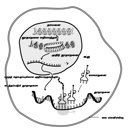 தூதாறனை வரிப்படம்